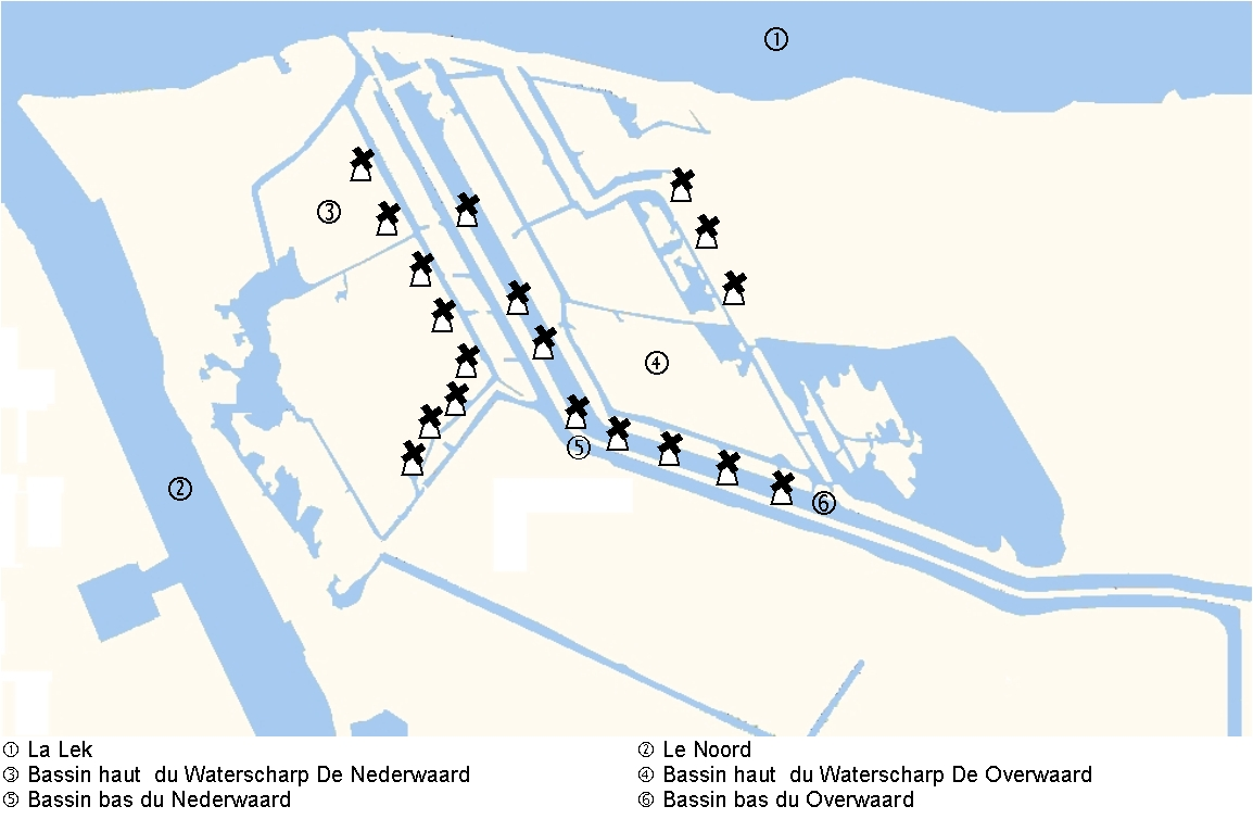 Carte du réseau de Kinderdijk